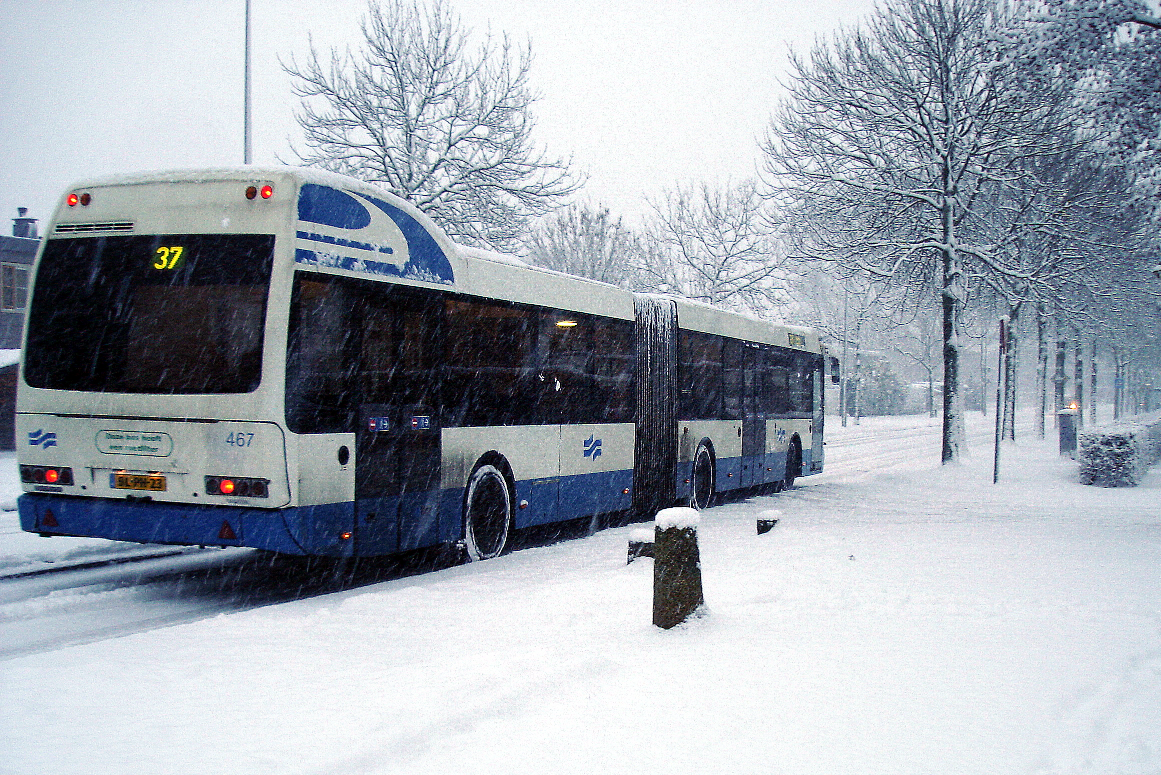 Ondanks het winterweer reden de bussen (hier bus 467 op lijn 37) in Amsterdam-noord gewoon door. Weliswaar stapvoets, en met flinke vertraging, maar daar hoorde je de reizigers niet over. Die hadden alle begrip en waren blij dat ze naar huis konden in de spits. Ik ben zelf net uit deze bus gestapt.